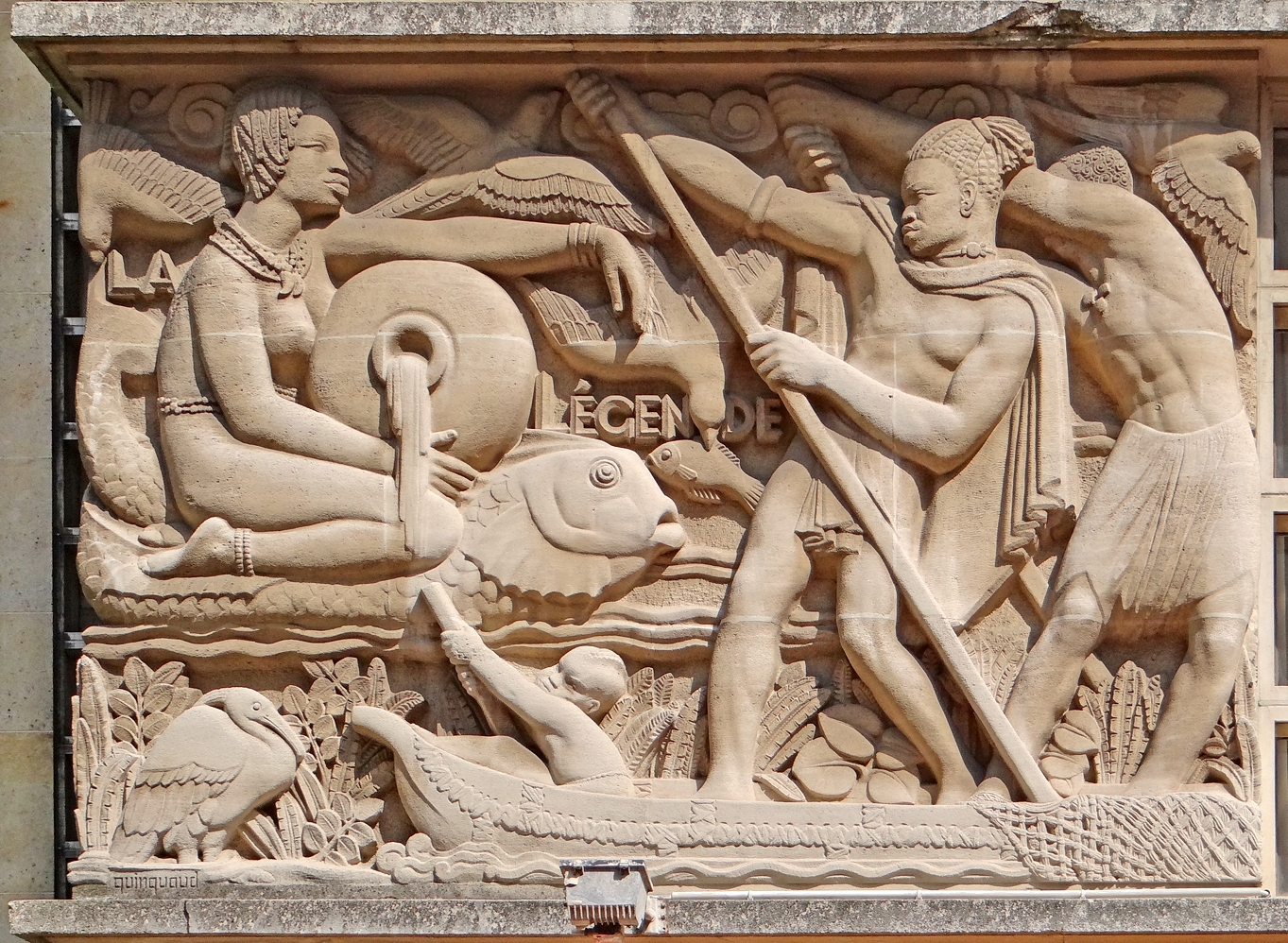 Décor de la façade de la résidence Lucien Paye, ancienne maison de la France d'Outre-mer Le bâtiment est l’œuvre de l'architecte Albert Laprade, les décors sont d'Anna Quinquaud Article de Wikipedia sur Anna Quinquaud La Résidence Lucien PAYE a été inaugurée en 1951, sous le nom de Maison de la France d’Outre-Mer. Sa vocation initiale était d’accueillir à Paris les étudiants originaires des territoires français d'outre-mer. Après l’indépendance des anciennes colonies, la résidence a permis de loger en priorité les ressortissants des pays d’Afrique Noire. En 1972, elle a été rebaptisée Lucien PAYE. Cet universitaire, ministre de l’Éducation Nationale en 1961 et ancien haut responsable de la France au Sénégal, a joué un rôle important dans la création des universités africaines. Voir l'histoire de cette maison sur le site officiel de la Cité internationale universitaire de Paris (CIUP)